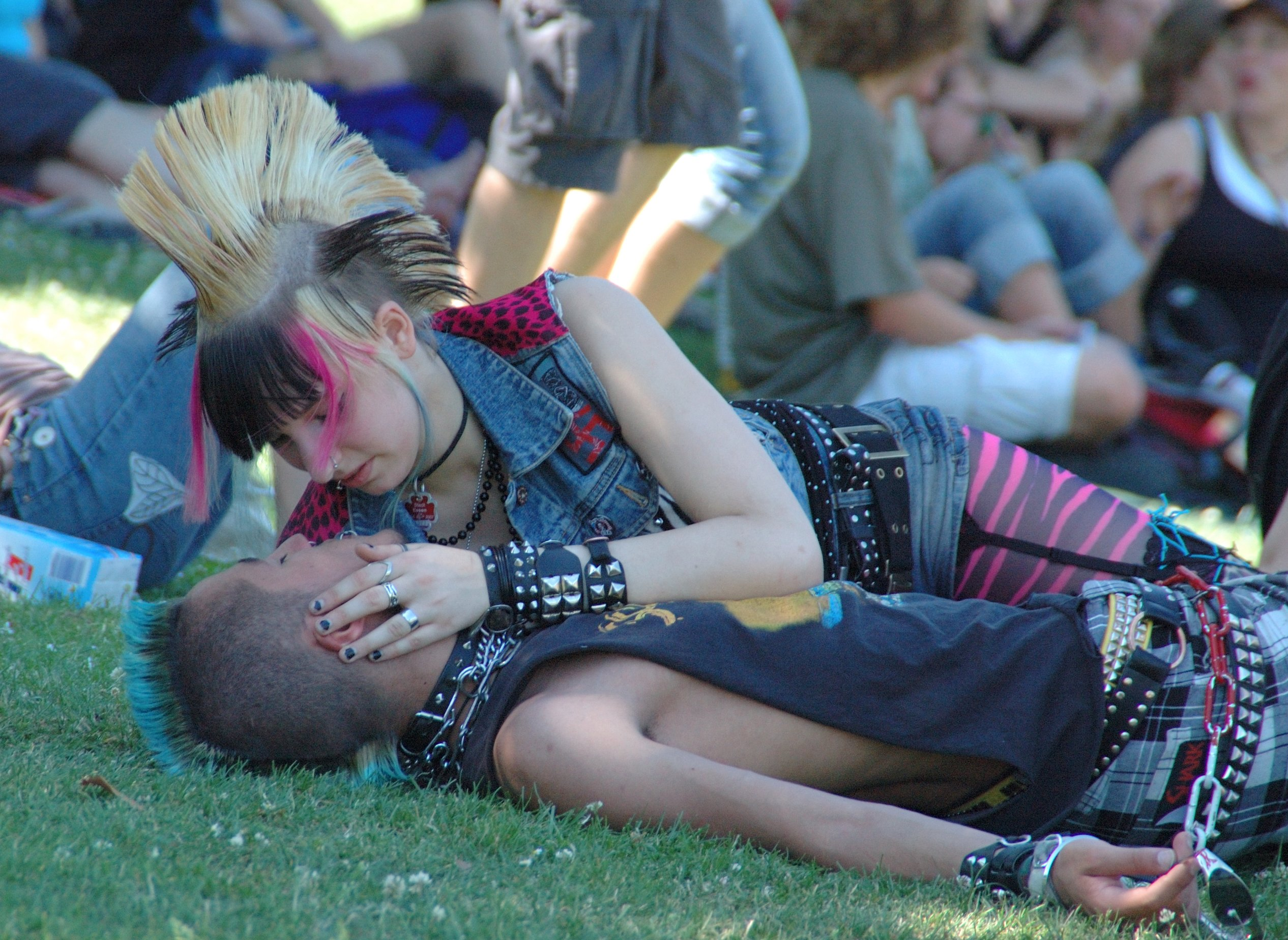 punks in love, Rheinkultur 2006, Rheinauen, Bonnpunks in love